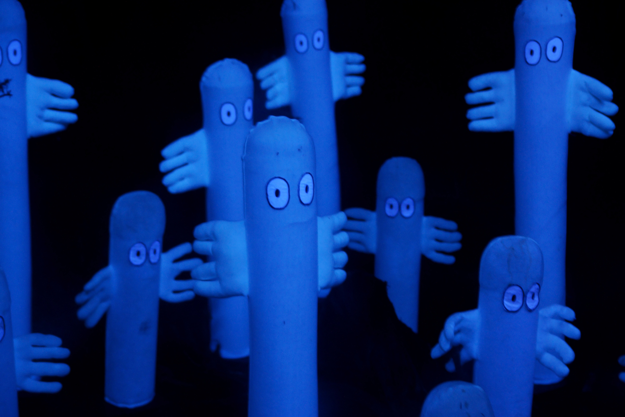 Hattivatteja Muumimaailmassa, Naantalissa.